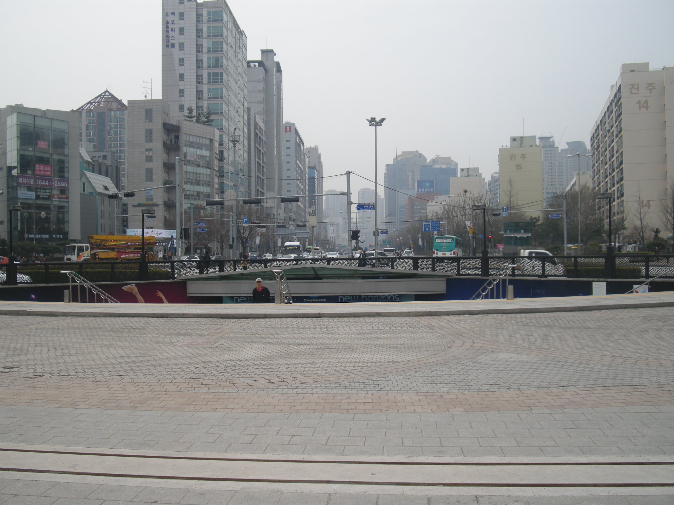 서울 지하철 8호선 몽촌토성역 1번 출구와 올림픽공원 삼거리